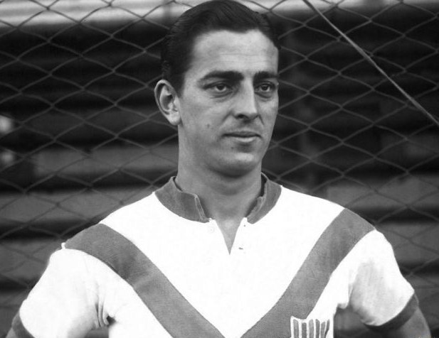 Victorio Luis Spinetto en el año de su debut profesional(1932)